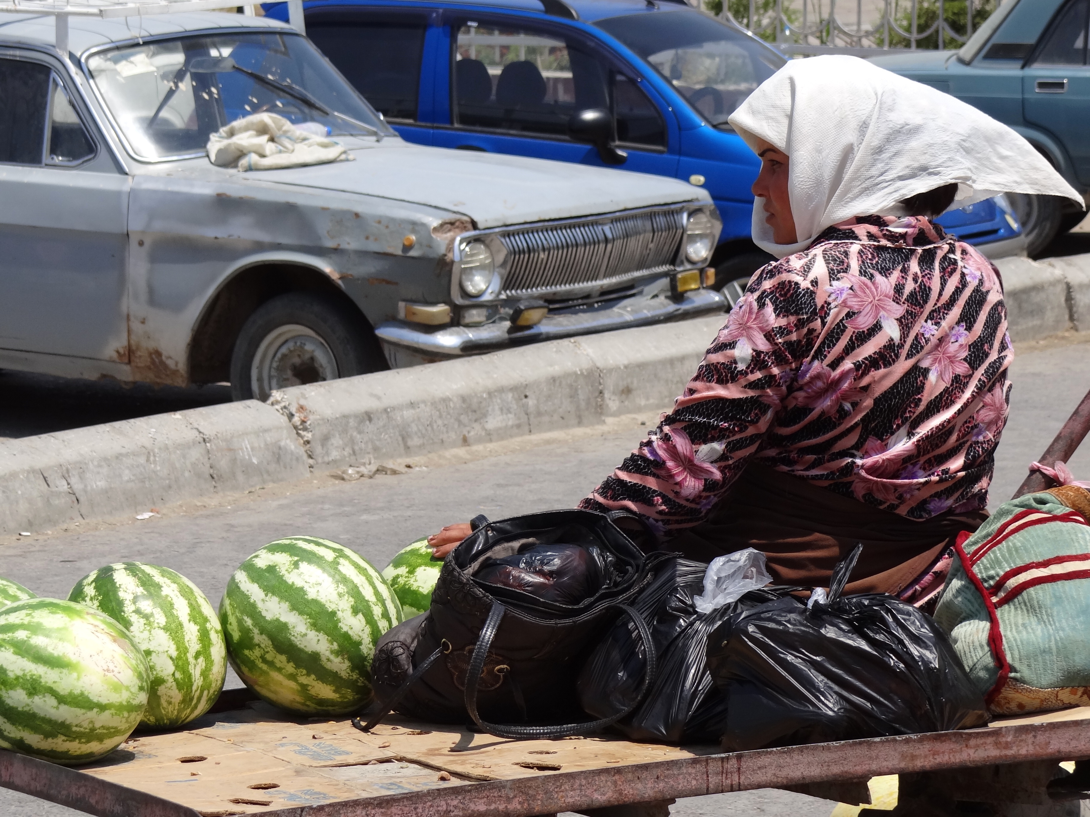 Woman Watermelon Vendor - Bazaar - Bukhara - Uzbekistan